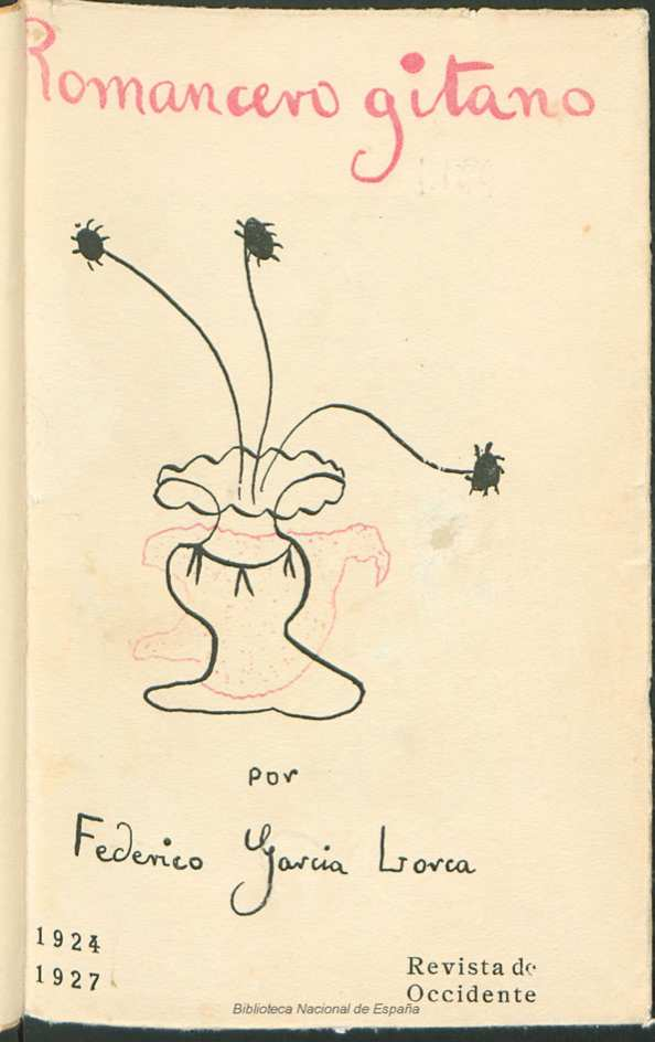 Primer romancero gitano : 1924 1927 por Federico García Lorca Autor: García Lorca, Federico (1898-1936) Fecha: 1928 Datos de edición: Madrid, Revista de Occidente